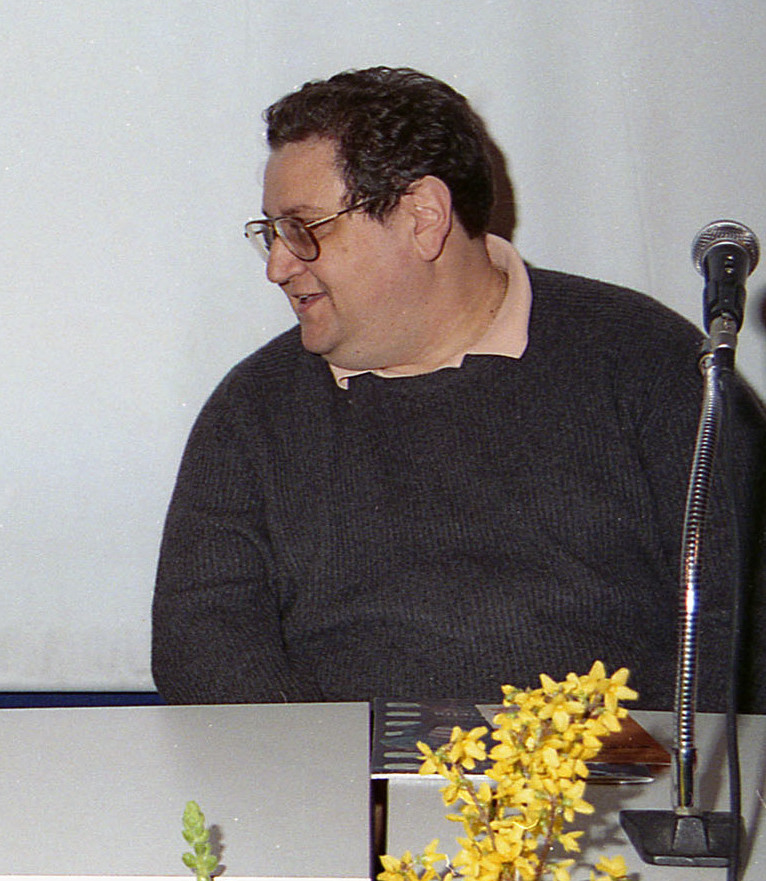 Vincenzo Mollica